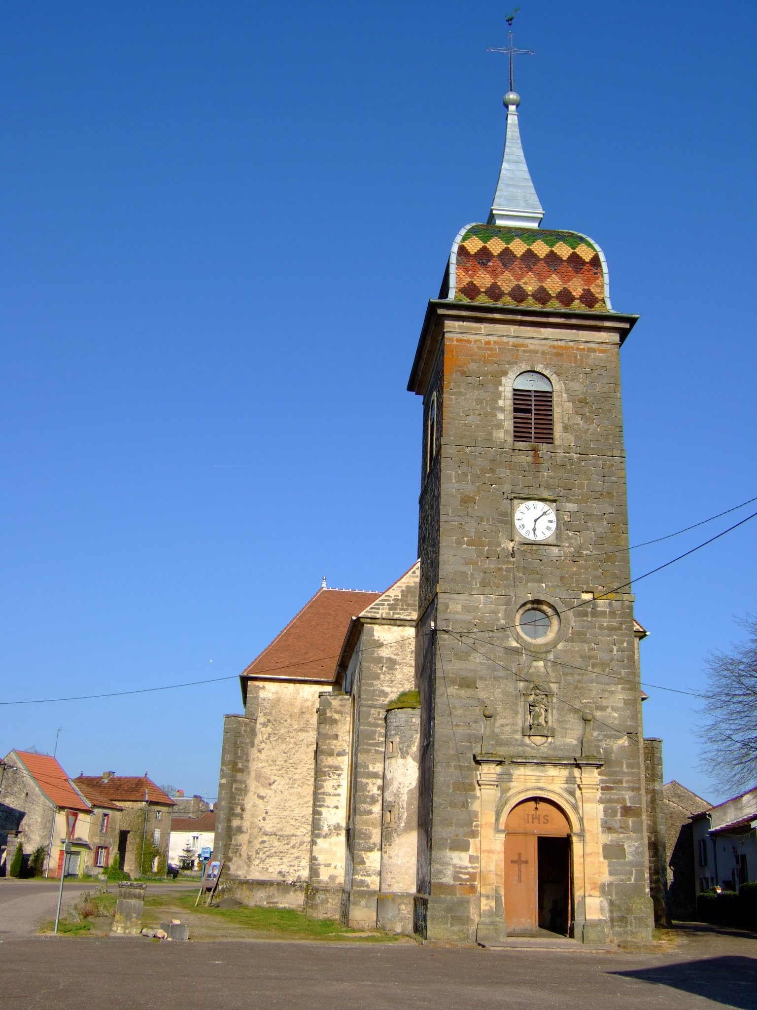 L'église de Vernois-sur-Mance